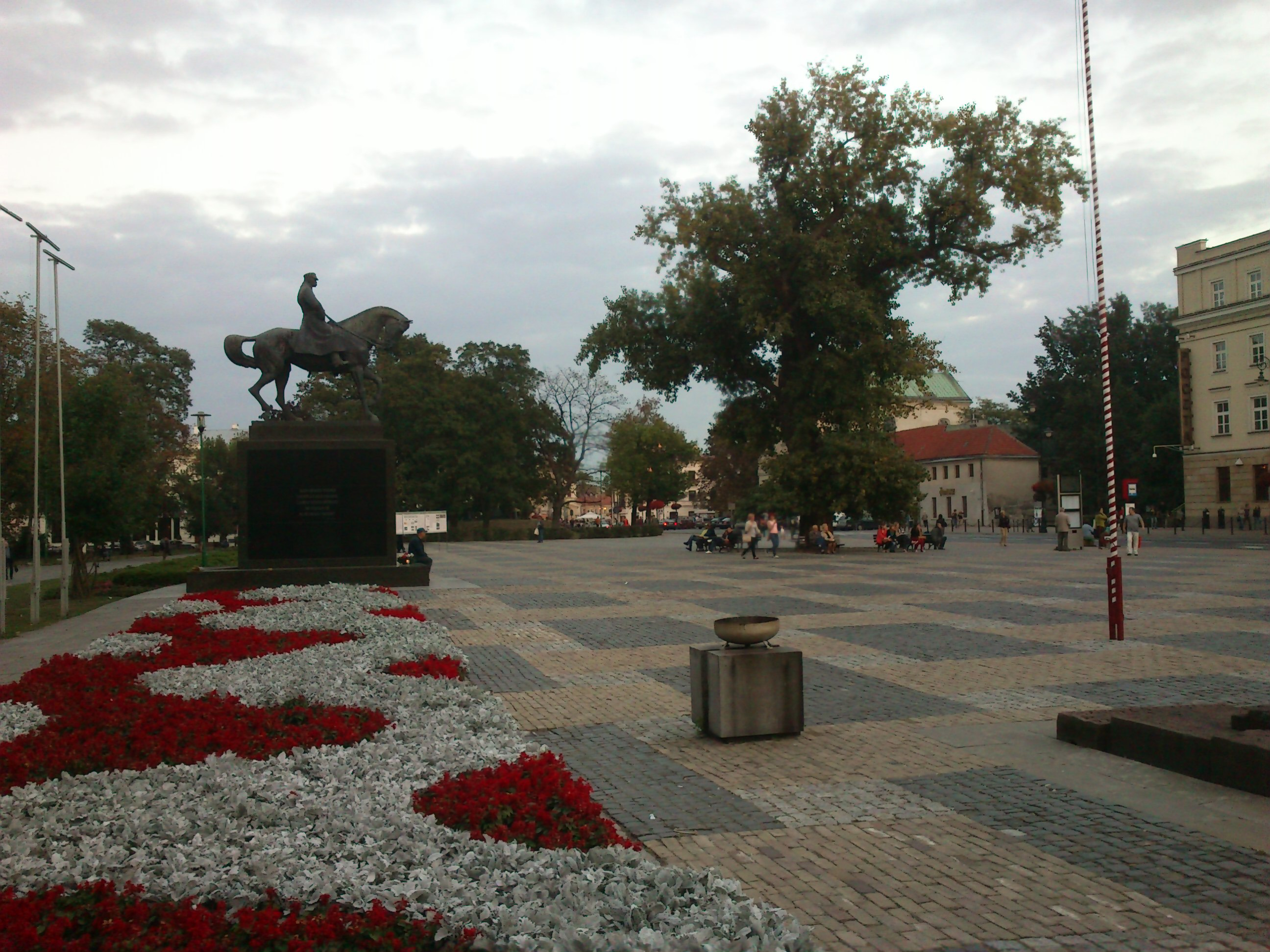 plac Litewski - ukształtowanie placu z zabudową